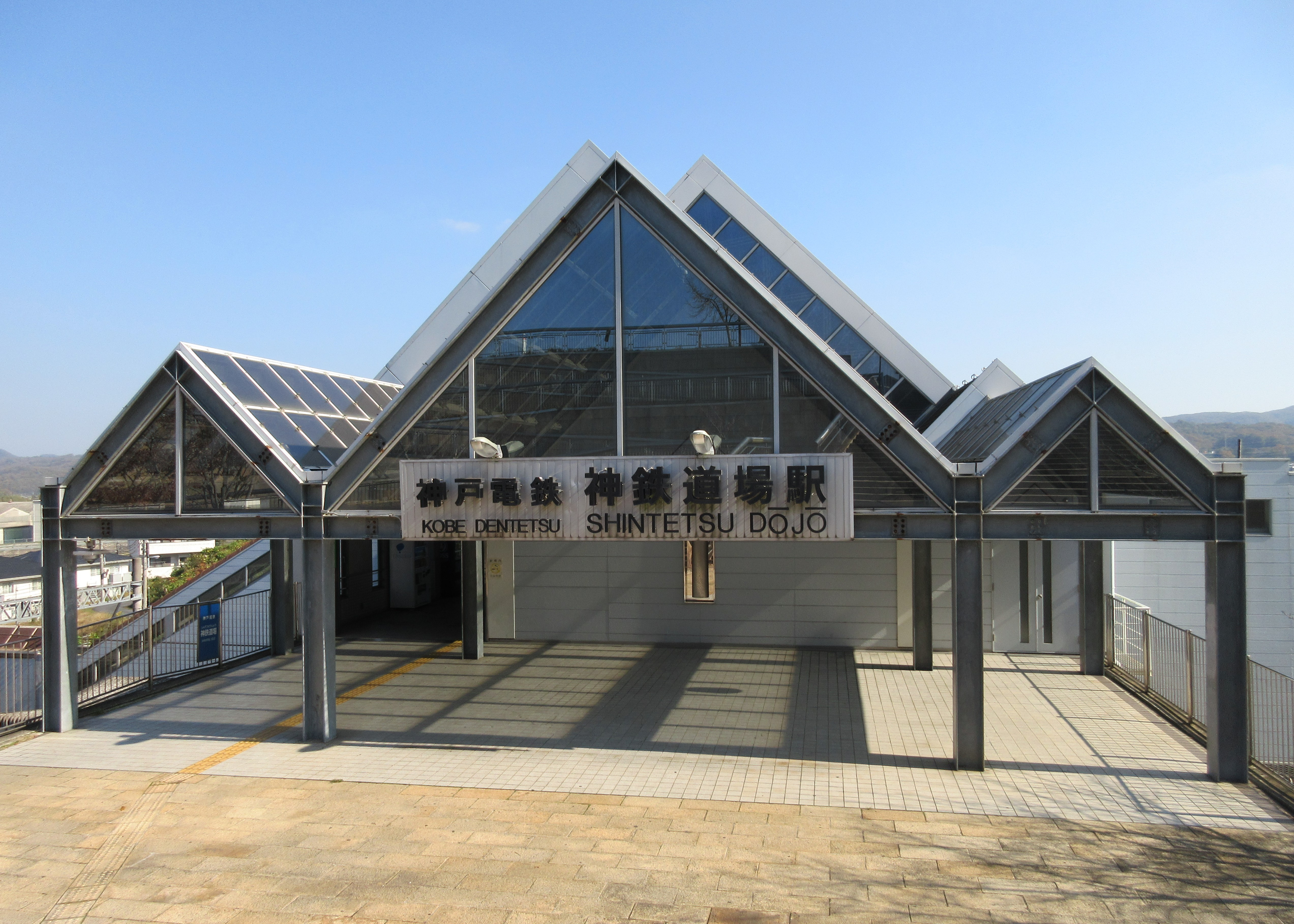 神鉄道場駅